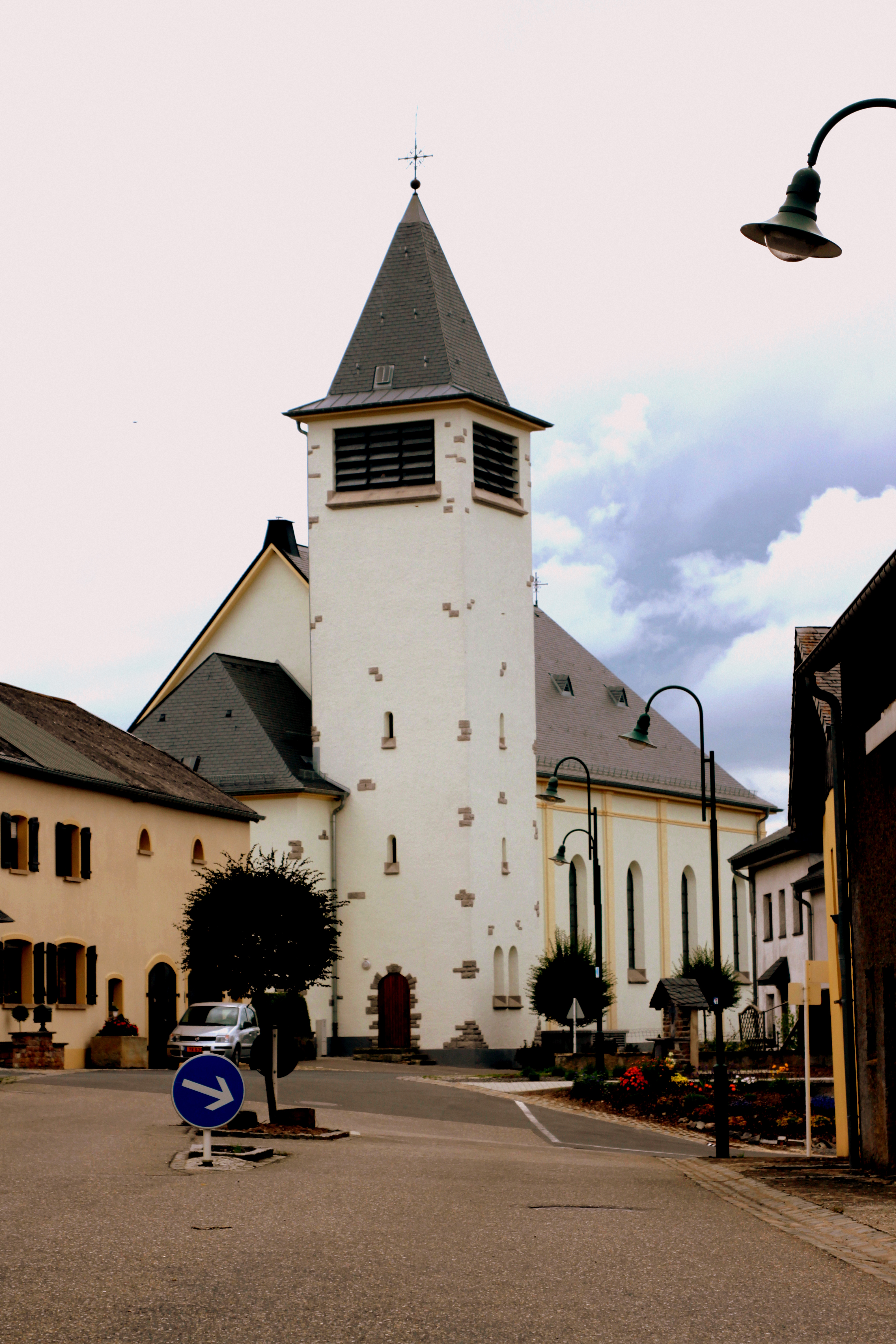 D'Kierch vun Hengescht